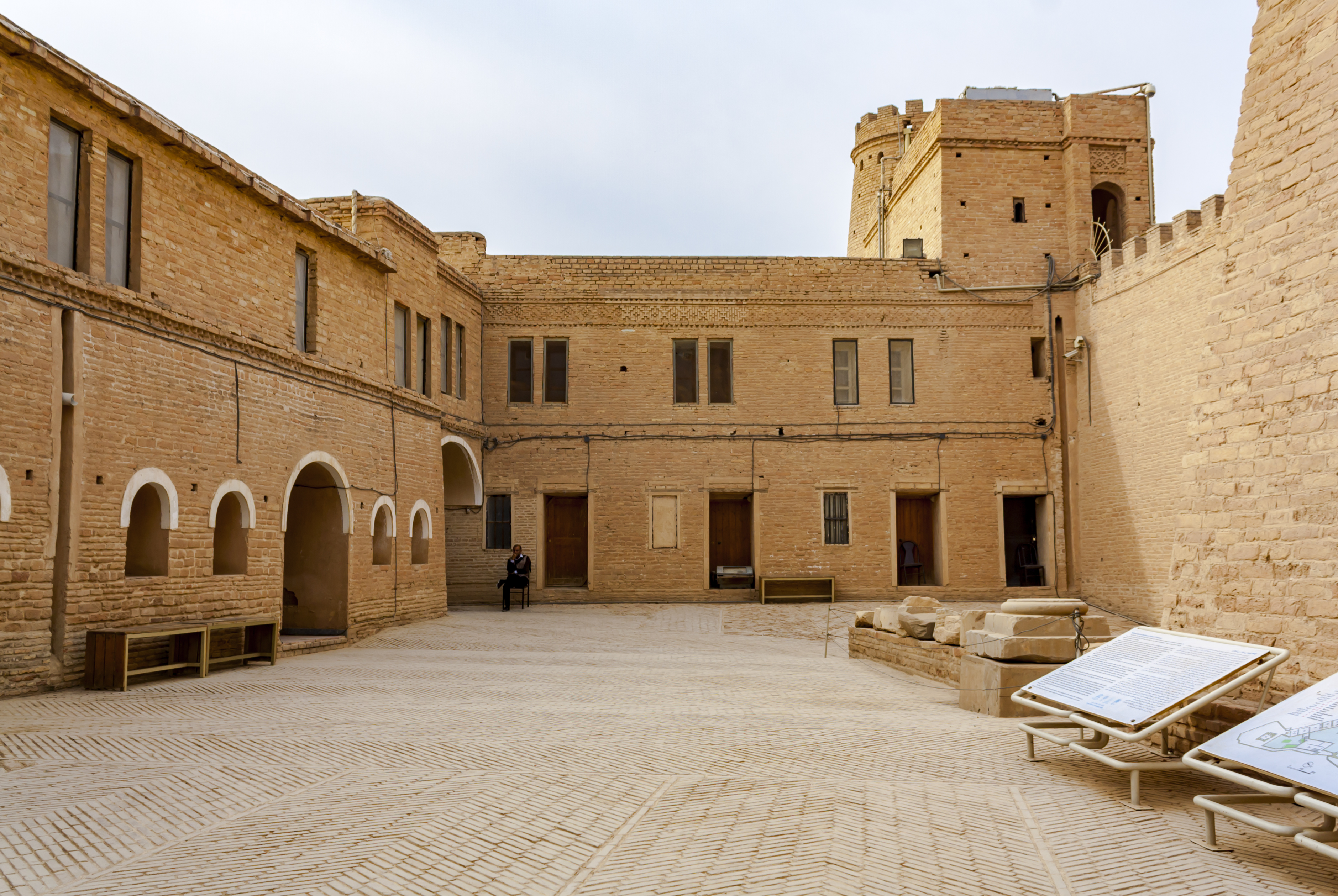 قلعه شوش که به قلعه اکروپل یا قلعه فرانسوی‌ها نیز شهرت دارد به دست هیئت باستان شناسی فرانسوی در سال ۱۸۹۷ میلادی روی بلندترین نقطه شهر شوش بنا شده این قلعه شباهت بسیار زیادی به زندان باستیل فرانسه دارد که با استفاده از آجرهای به دست آمده از کاخ داریوش و تعدادی از آجرهای منقوش به خط میخی، به دست معماران دزفولی بنا شده